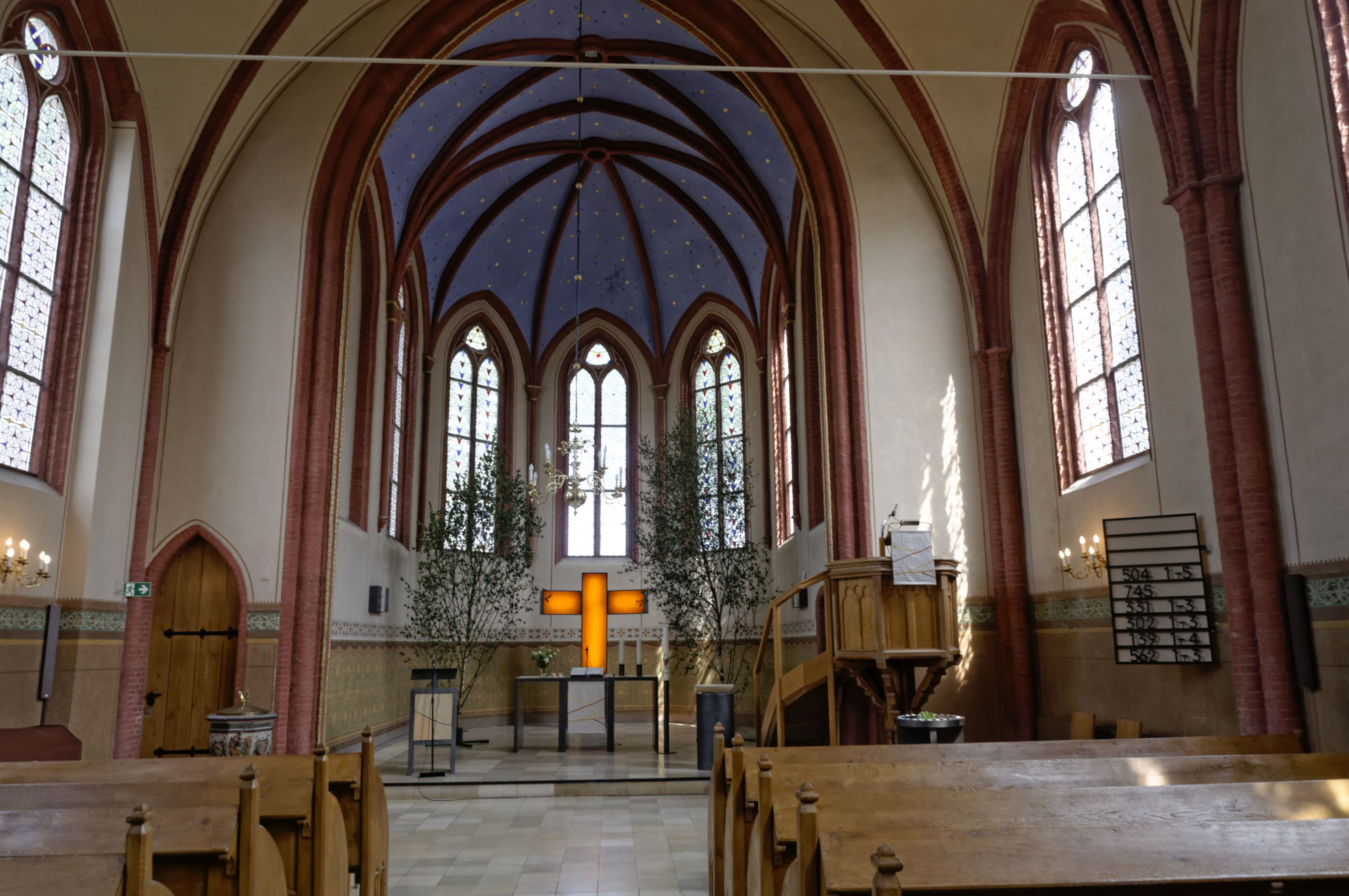 St. Jakobikirche (Bad Bederkesa)